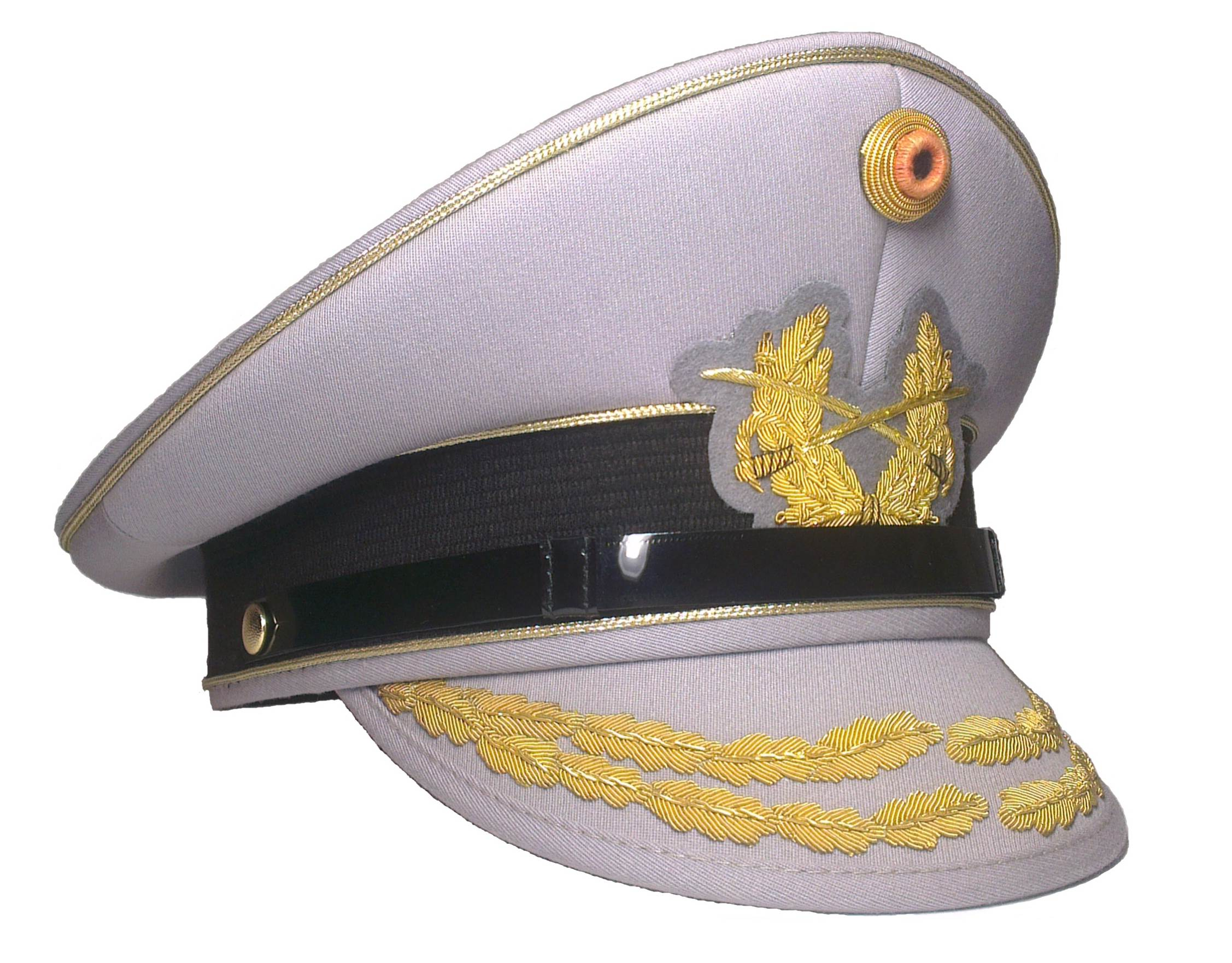 Schirmmütze Bundeswehr General Heer